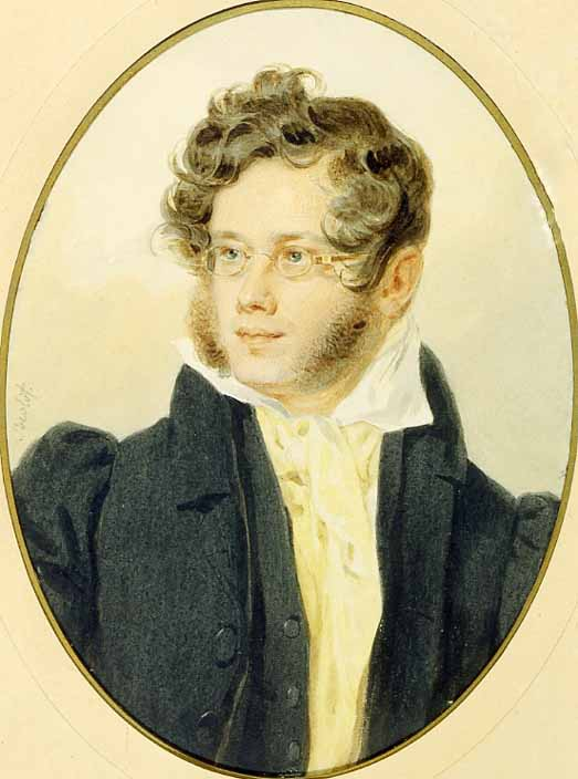 П. Ф. Соколов. Портрет князя П. А. Вяземского. 1824. Бумага, акварель, графитный карандаш, лак. Государственный Литературный музей Князь Петр Андреевич Вяземский (1792–1878)